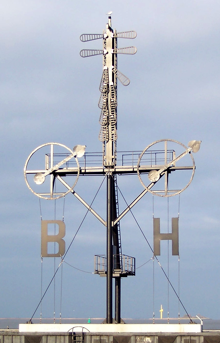 Bremerhaven: Rekonstruierter Semaphor vom Leuchtturm Hohe Weg. Wiederaufgebaut 2005 auf der Nordmole der Einfahrt zum Neuen Hafen. Angezeigt wird die Windstärke und die Windrichtung von Borkum (B) und Helgoland (H). Masthöhe ca. 20 m, Zeiger 4,5 m. Die Buchstaben "B" und "H" sowie die beiden Windrosen stammen vom Original. (